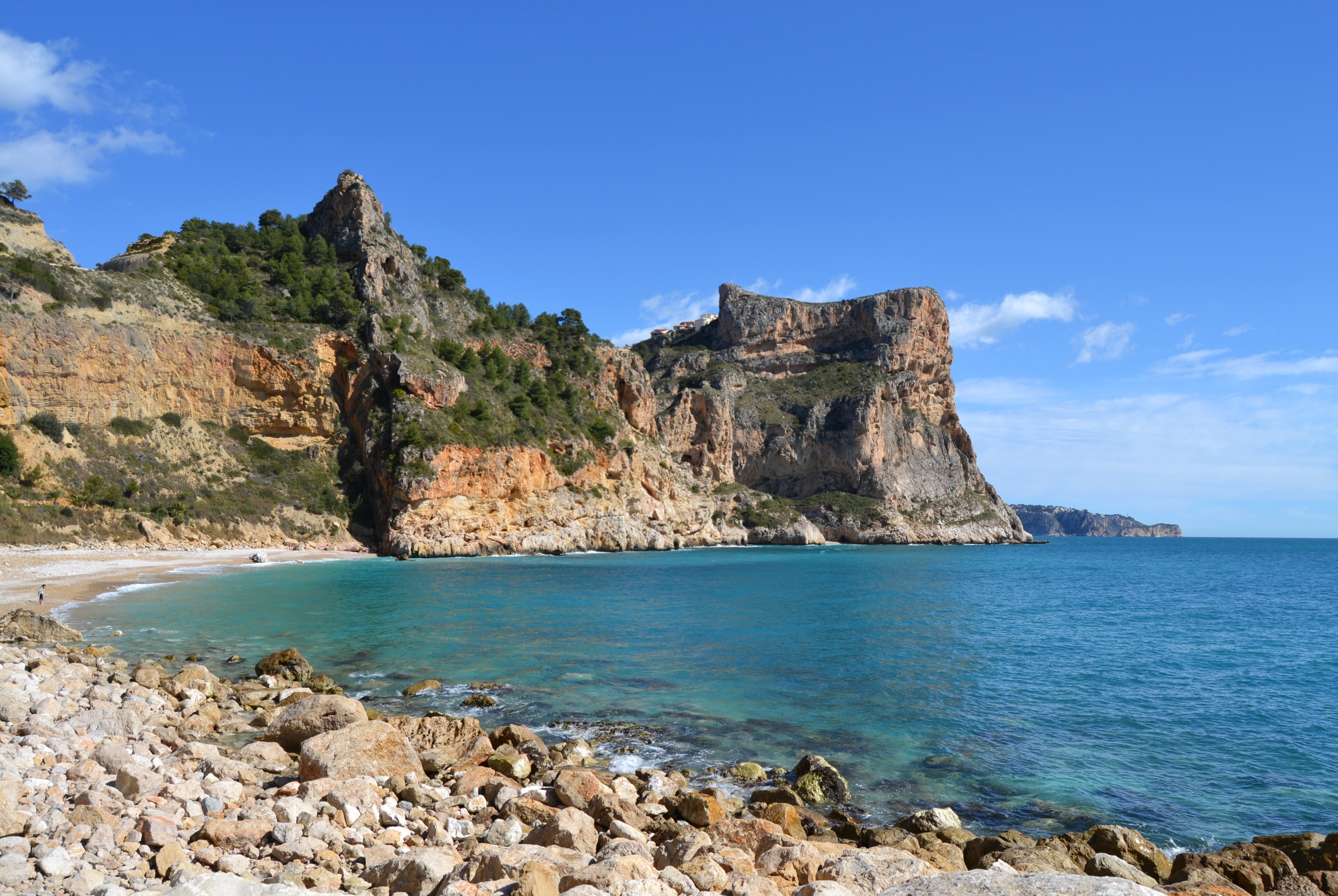 Cala del Moraig del Poble Nou de Bernitatxell.